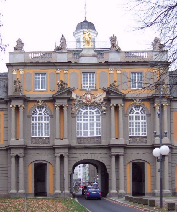 Bonn – Koblenzer Tor